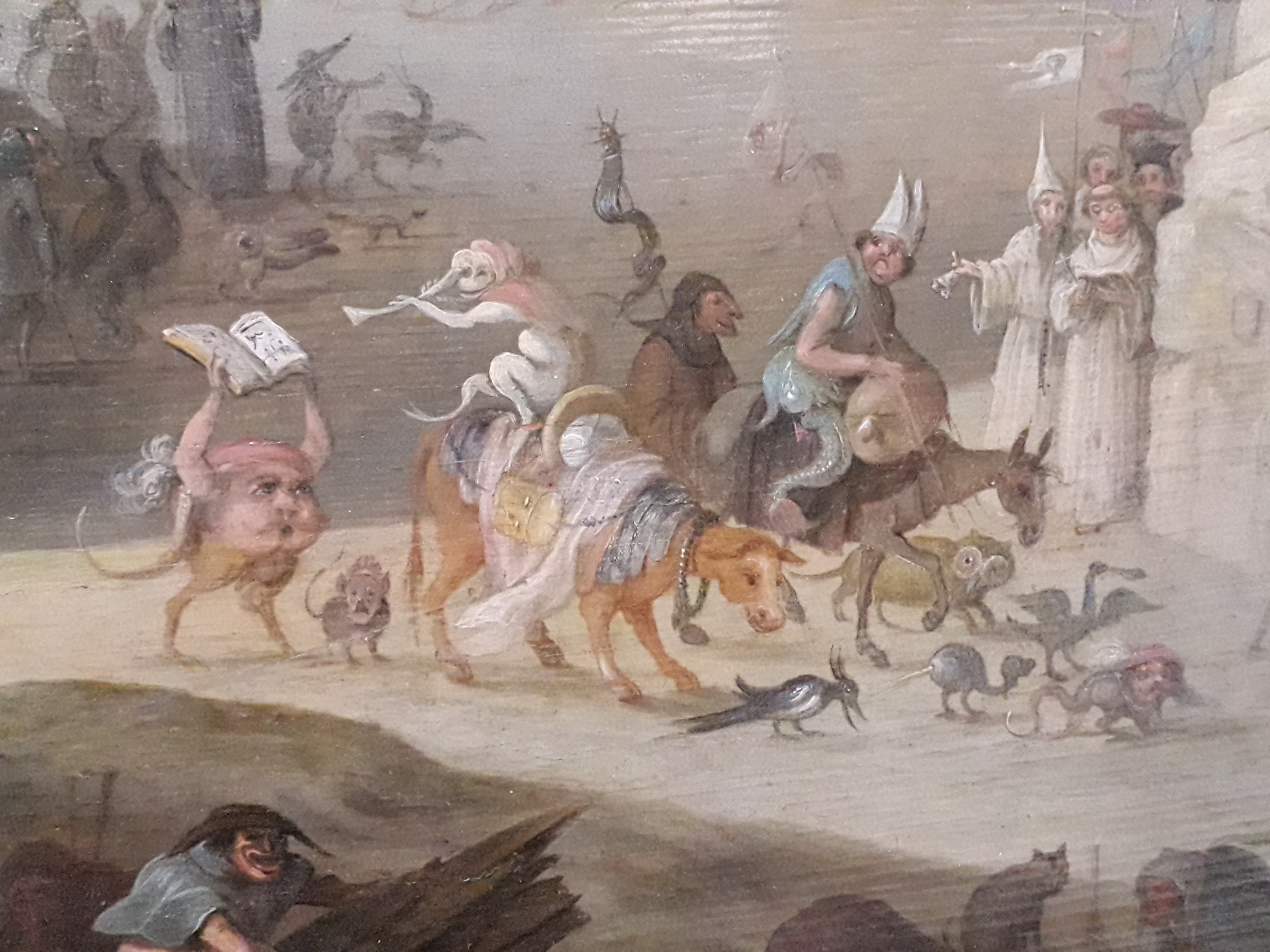 Sabbat de sorcières (Heksensabbat). Détail. Claes (Nicolae) Jacobz van der Heck (Alkaar, vers 1578 - même ville, 1652). Huile sur bois. 1635. Musée Bertrand, à Châteauroux, dans l'Indre, en France. Inv. 307.